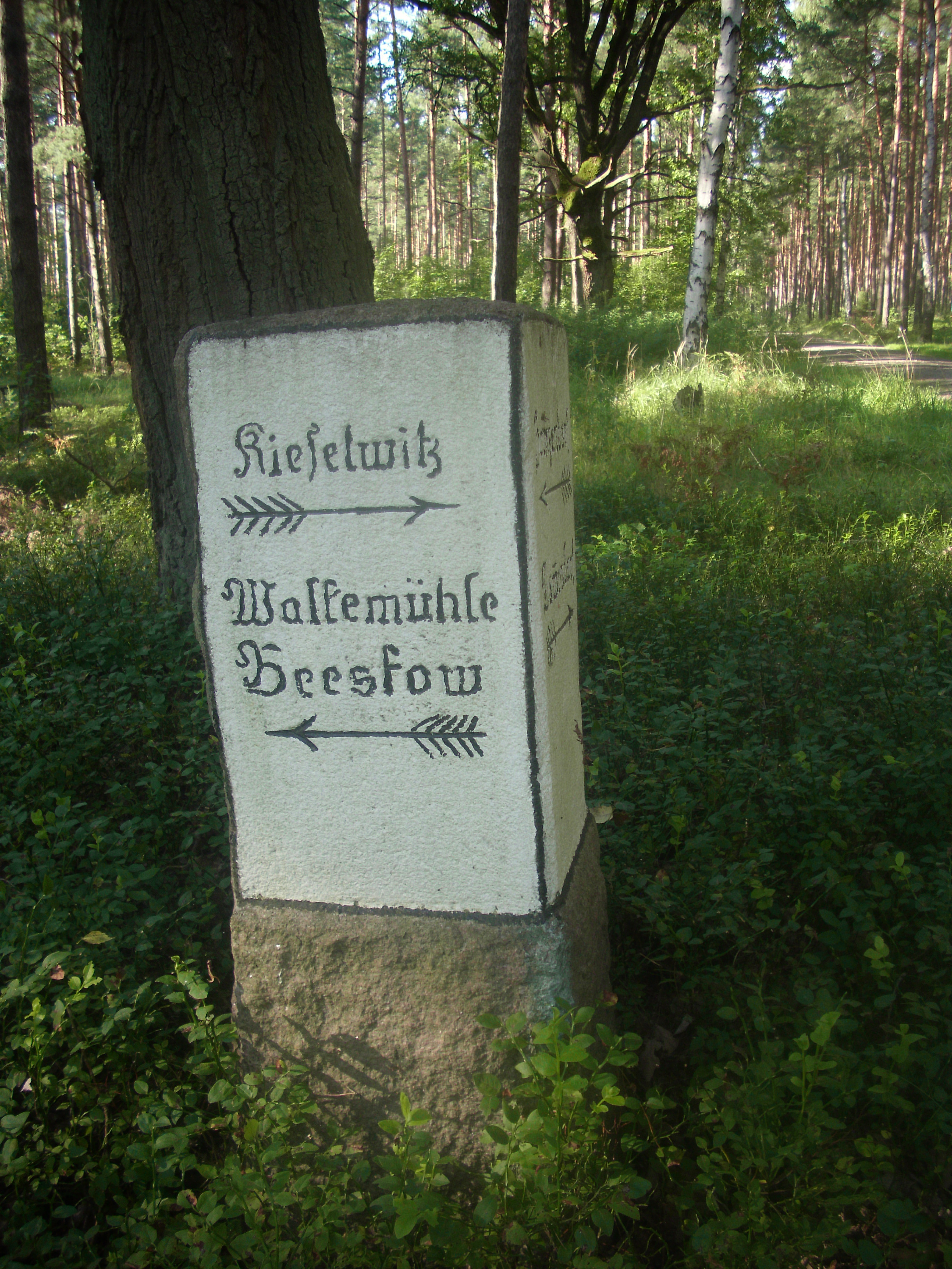 Wegestein zur Walkemühle, Naturpark Schlaubetal, Brandenburg